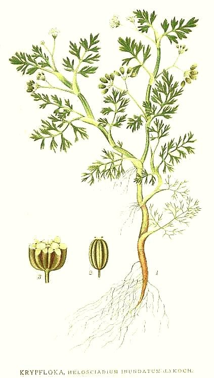 Apium inundatum (L.) Rchb. f., syn. Helosciadium inundatum (L.) W. D. J. Koch Original Description Krypfloka, Helosciadium inundatum (L.) Koch.